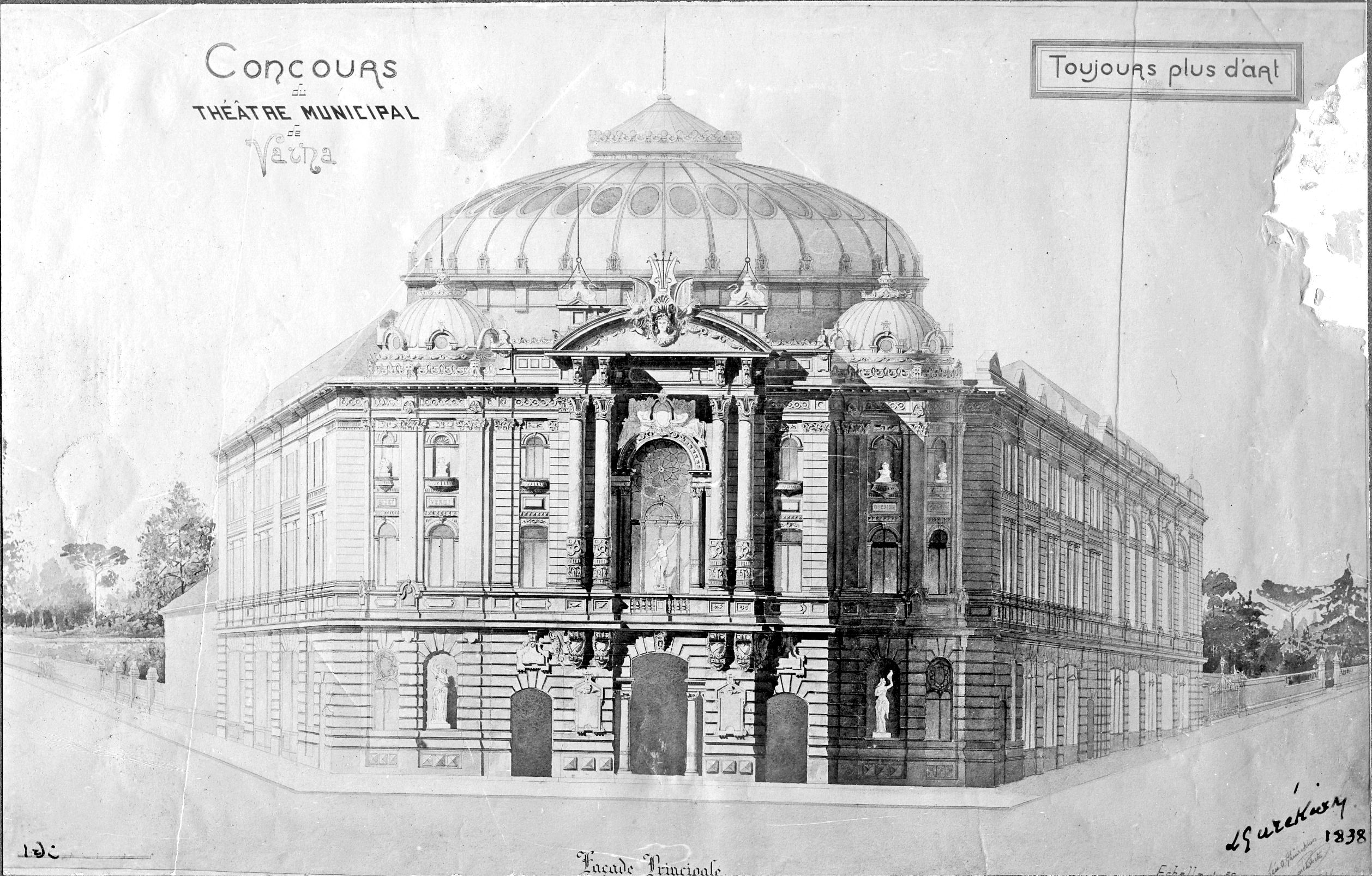 Léon Gurekian -Teatro di Varna